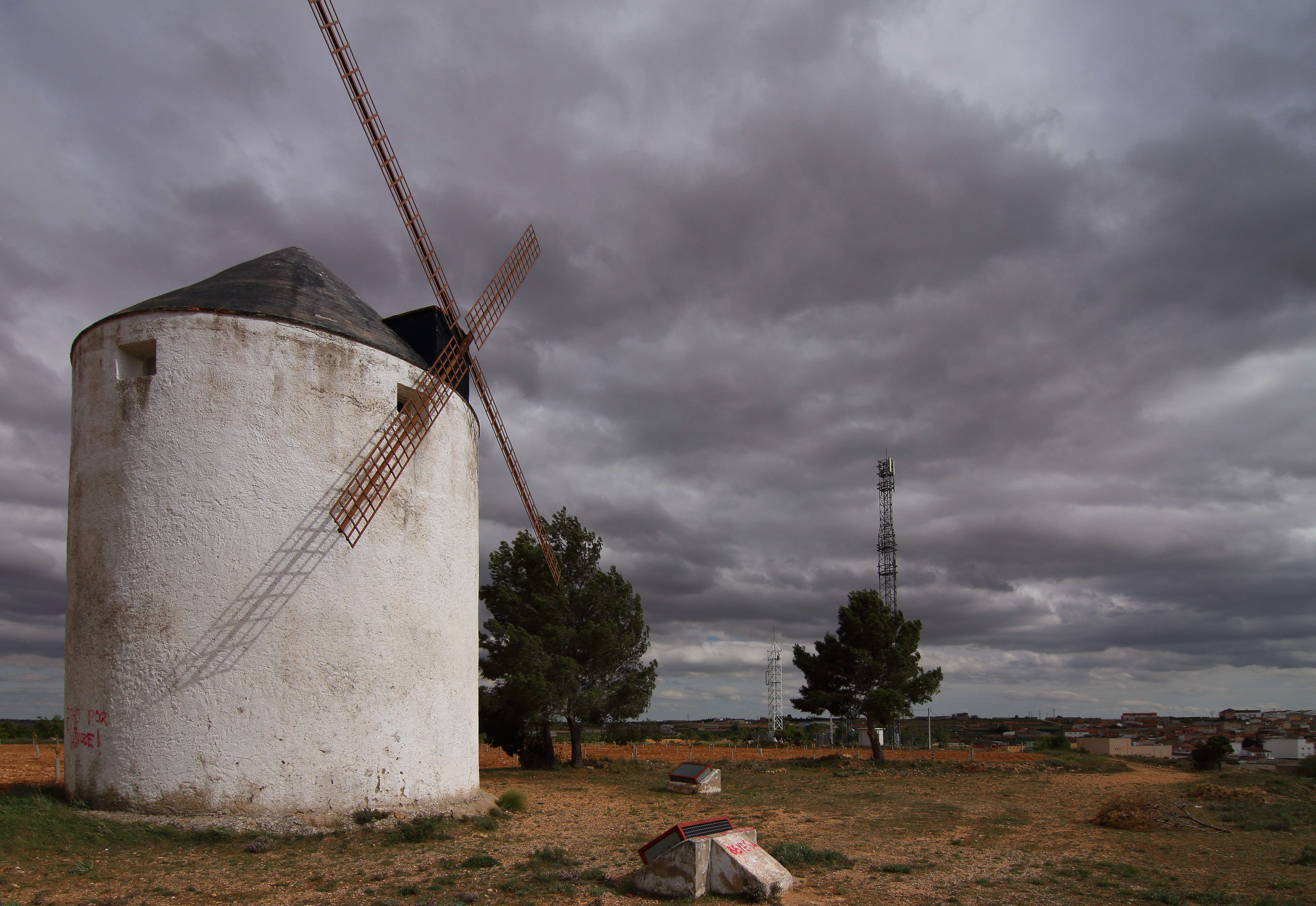 Ledaña, Molino, 02